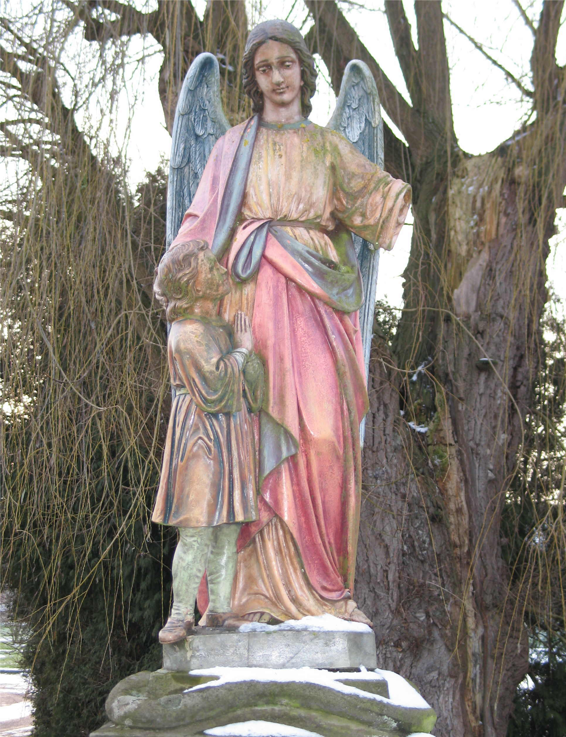 Eng Statu mat engem Schutzengel laanscht Strooss vir op Réimech zu Mutfert